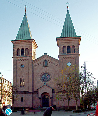 Sankt Pauls Kirke Århus Kommune, Denmark